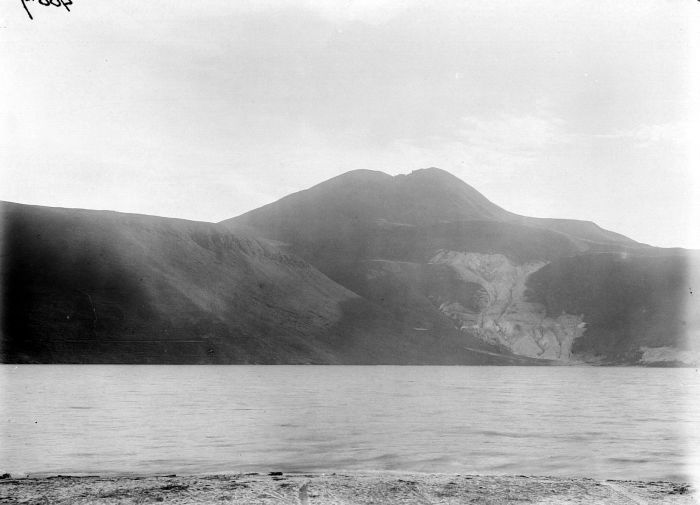 Negatief. Gezicht op de vulkaan Pusukbukit, die door de Batak bevolking wordt vereerd als heilige berg